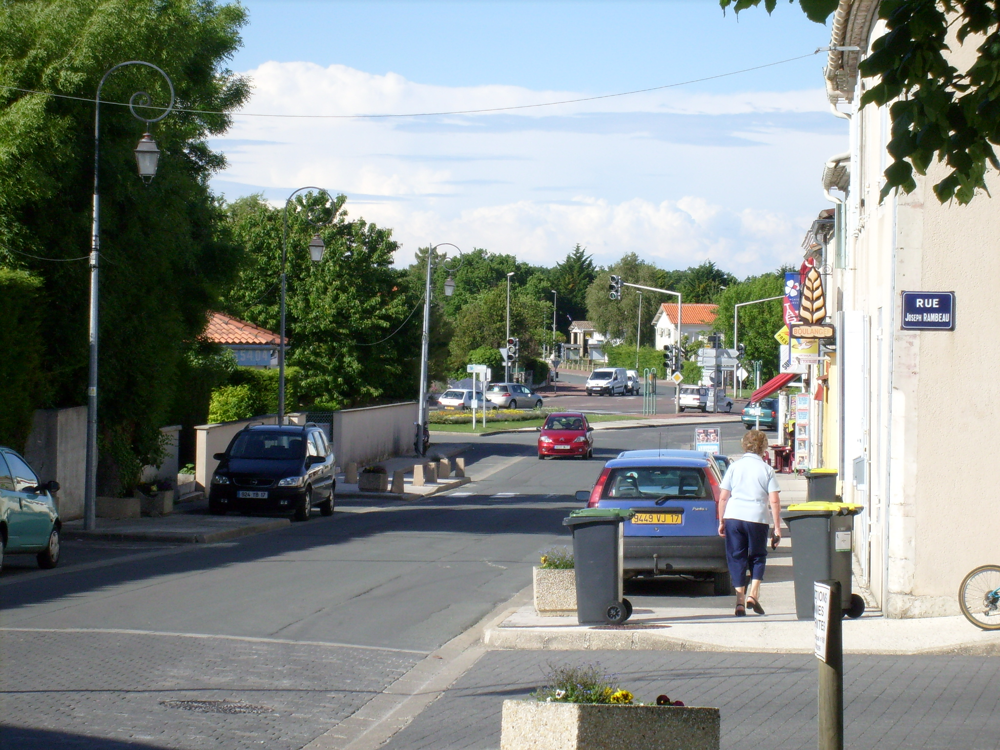 Le centre bourg du village de Médis, Royan, Charente-Maritime, France.